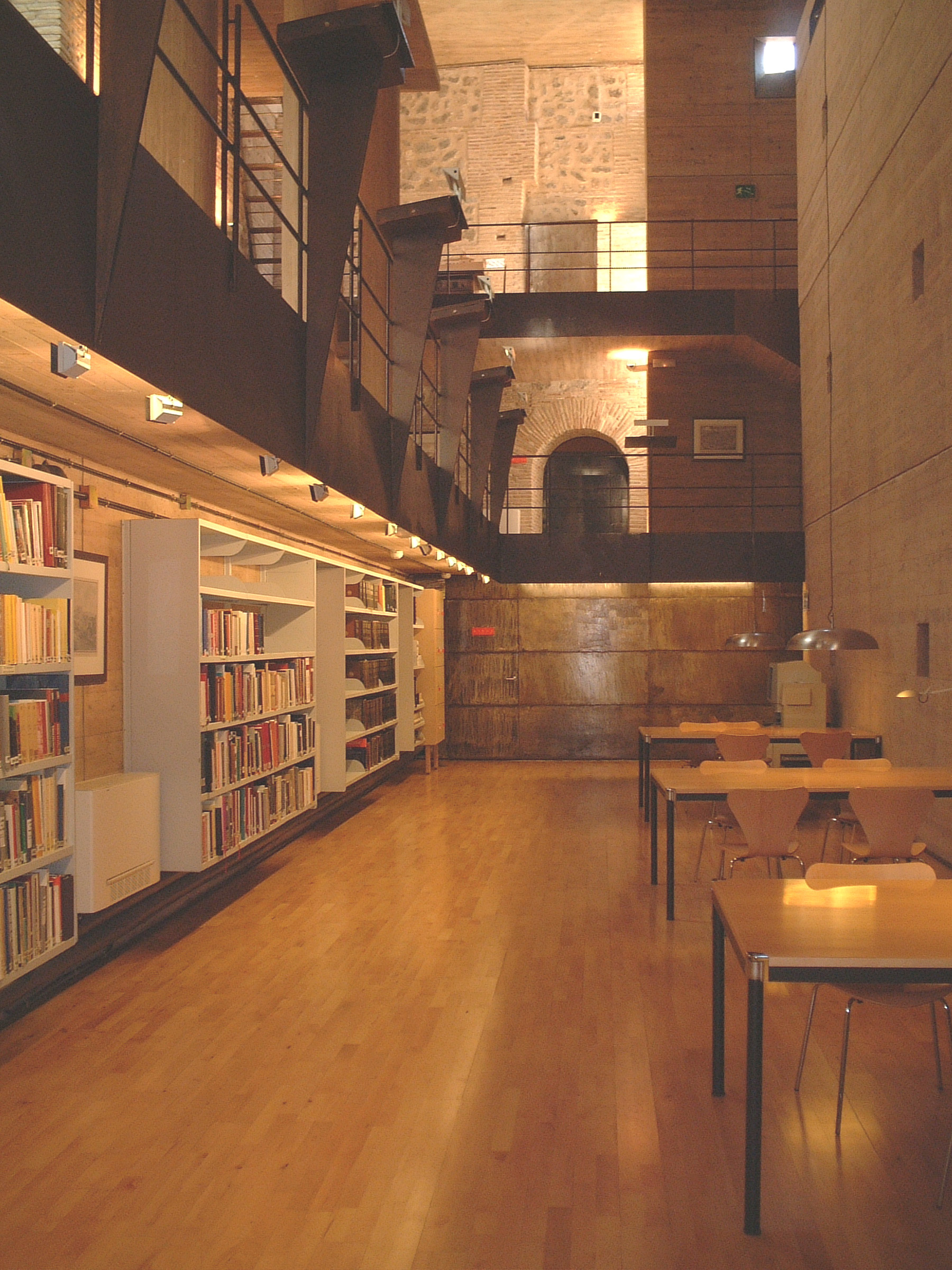 Instancias del Archivo Municiapal de Toledo